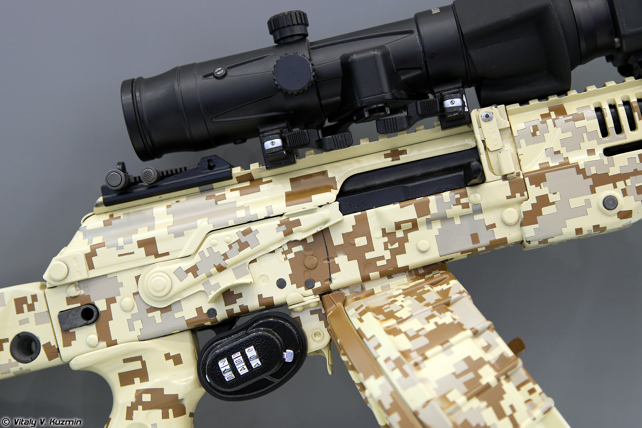 Ручной пулемет РПК-16